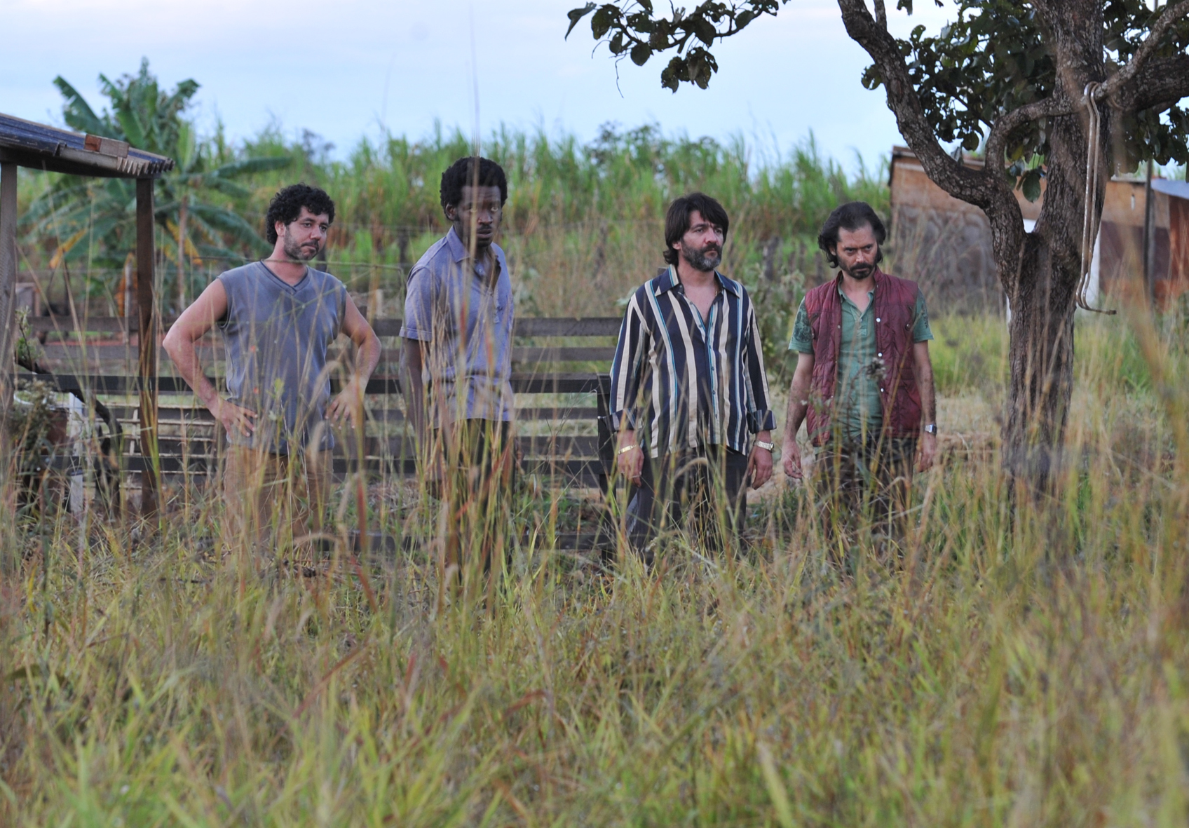 Brasília - Os atores Abaetê Queiroz, como Barata, Fabrício Boliveira, como João de Santo Cristo, Cesar Troncoso, como Pablo e Rômulo Augusto como Saci durante as gravações do filme Faroeste Caboclo, baseado na música da banda Legião Urbana